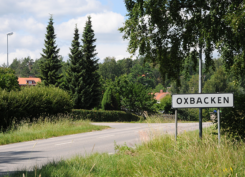 Oxbacken i Nyköpings kommun